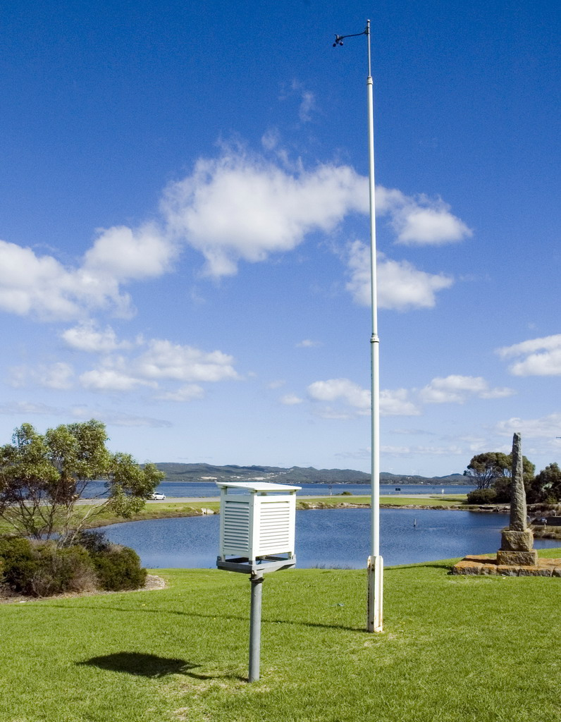 Stevenson screen and Anemometer.